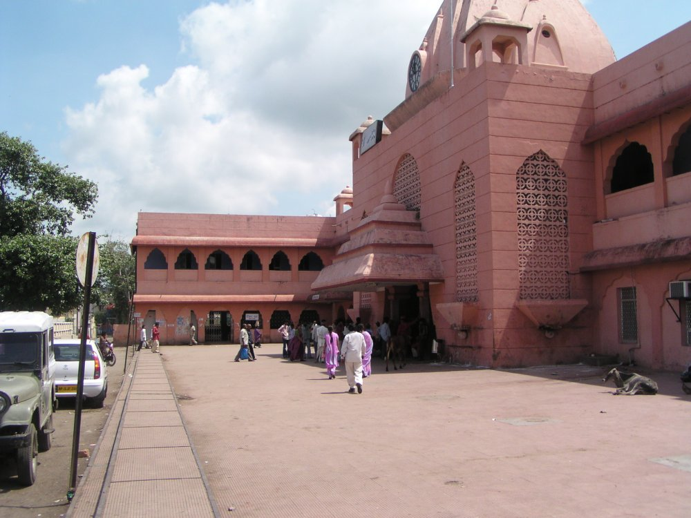 Bahnhofsgebäude in Ujjain